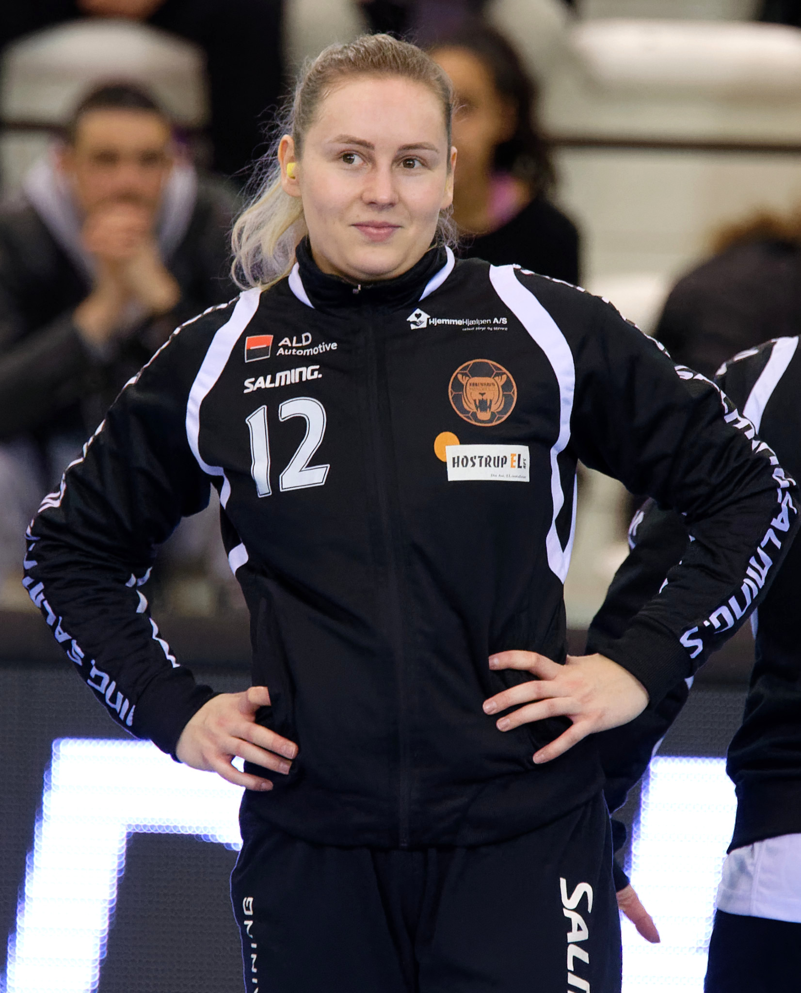 Rencontre de coupe EHF entre Issy Paris Hand et les danoises de Copenhague. A Issy-les-Moulineaux, le 28 janvier 2018.